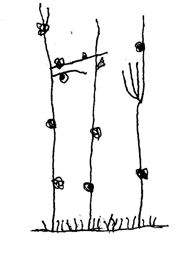 Benny & Benjamin(1975)より模写